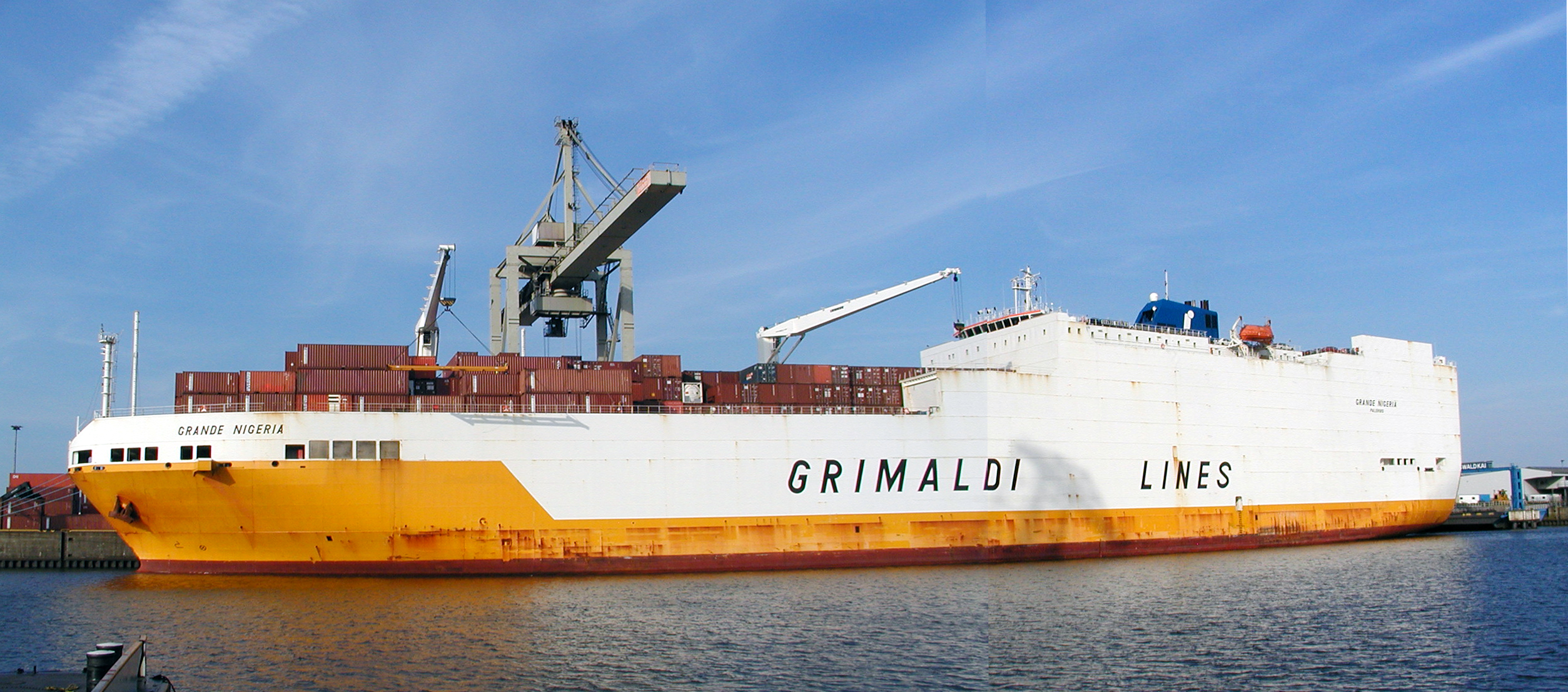 Das RoRo und Containerschiff „Grande Nigeria“ der Grimaldi Line. IMO Number: 9246580 MMSI Number: 247082500 Callsign: IBRF Length: 214 m Beam: 32 m